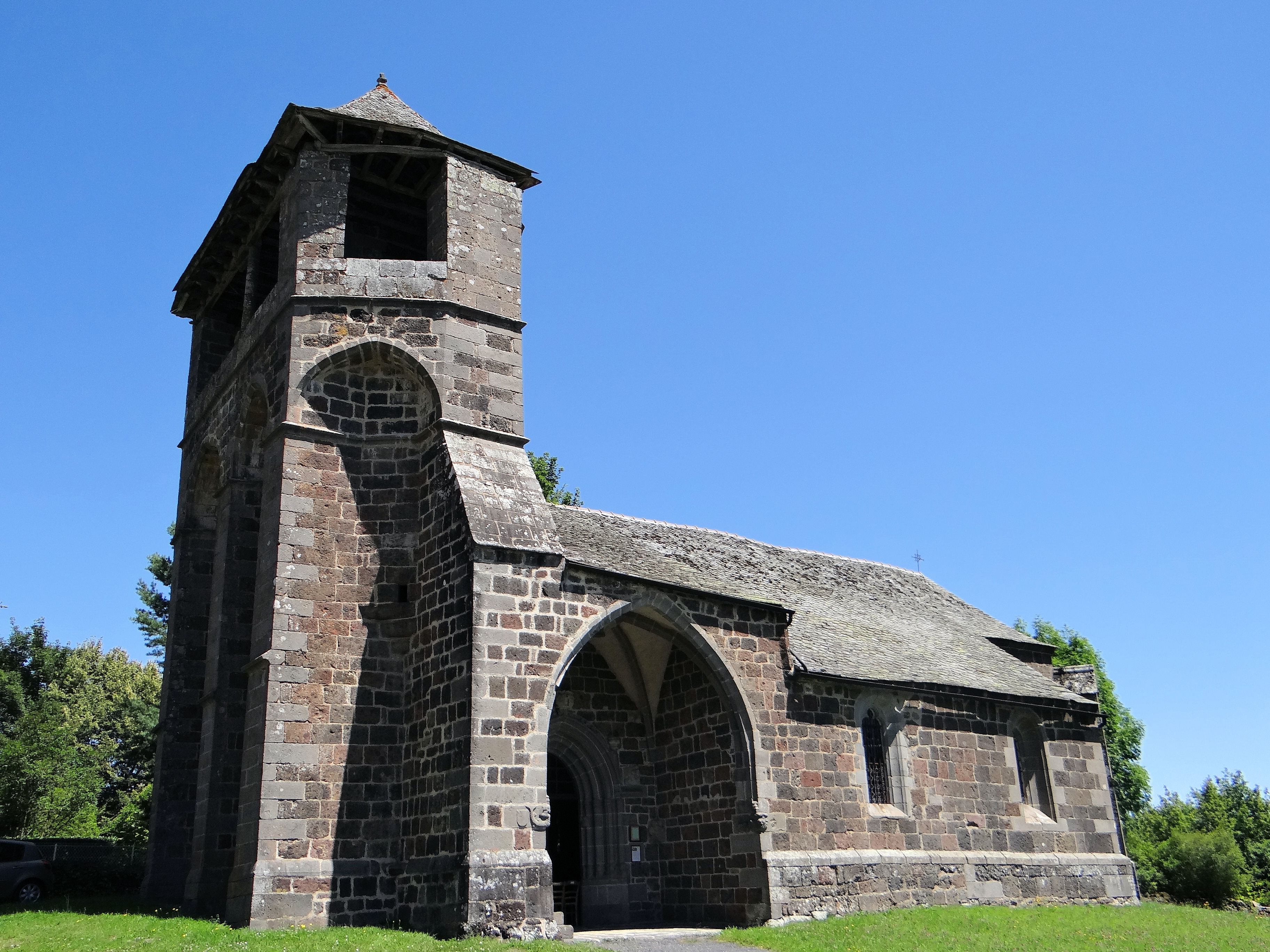 Albinhac (Brommat) - Église Saint-Roch - Ensemble